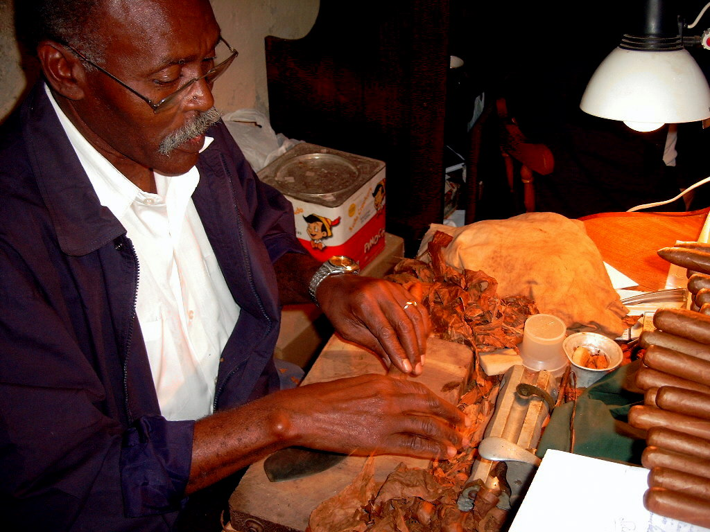 Zigarrendreher, Cuba